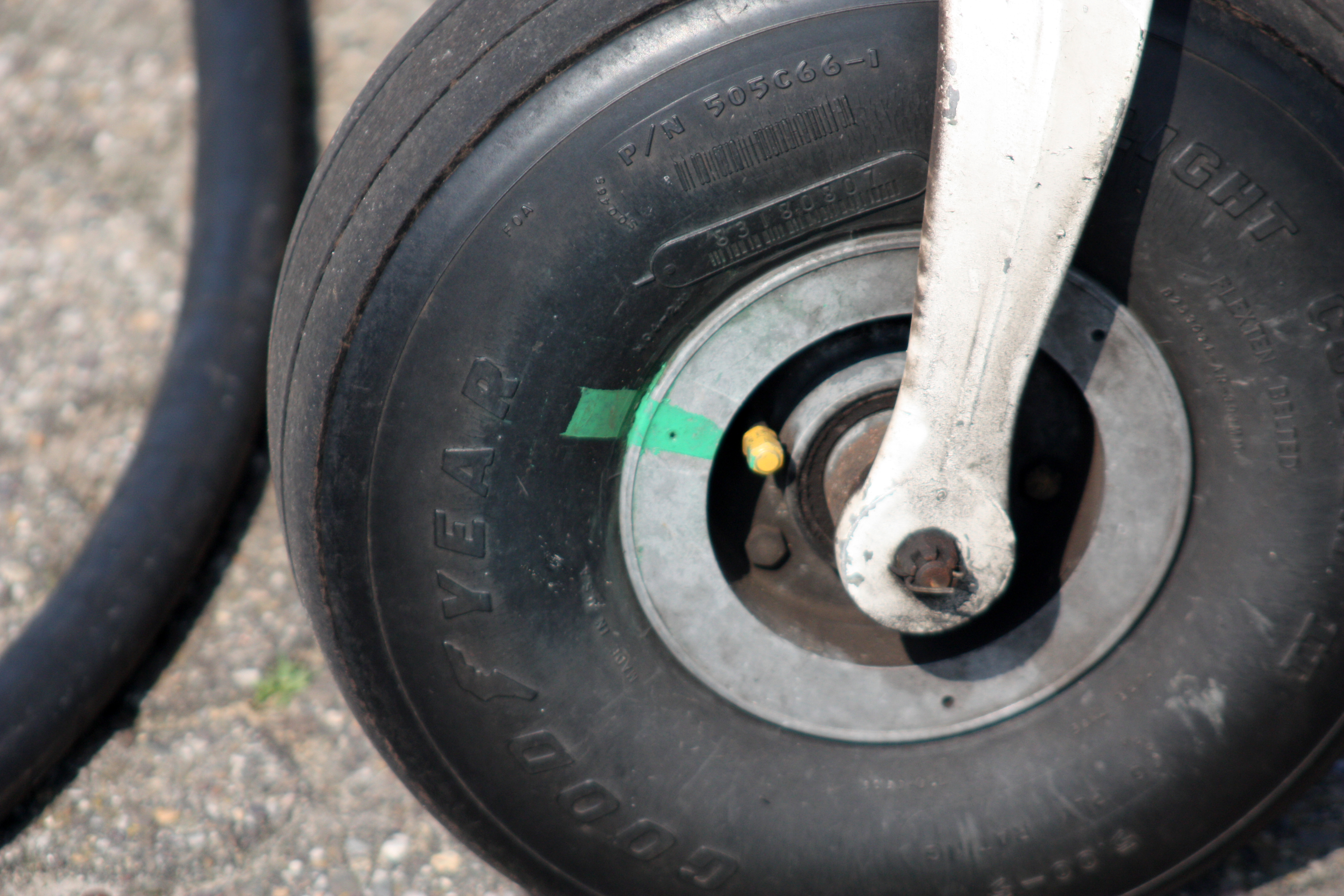 Flugzeugreifen Kleinflugzeug Rutschmarke